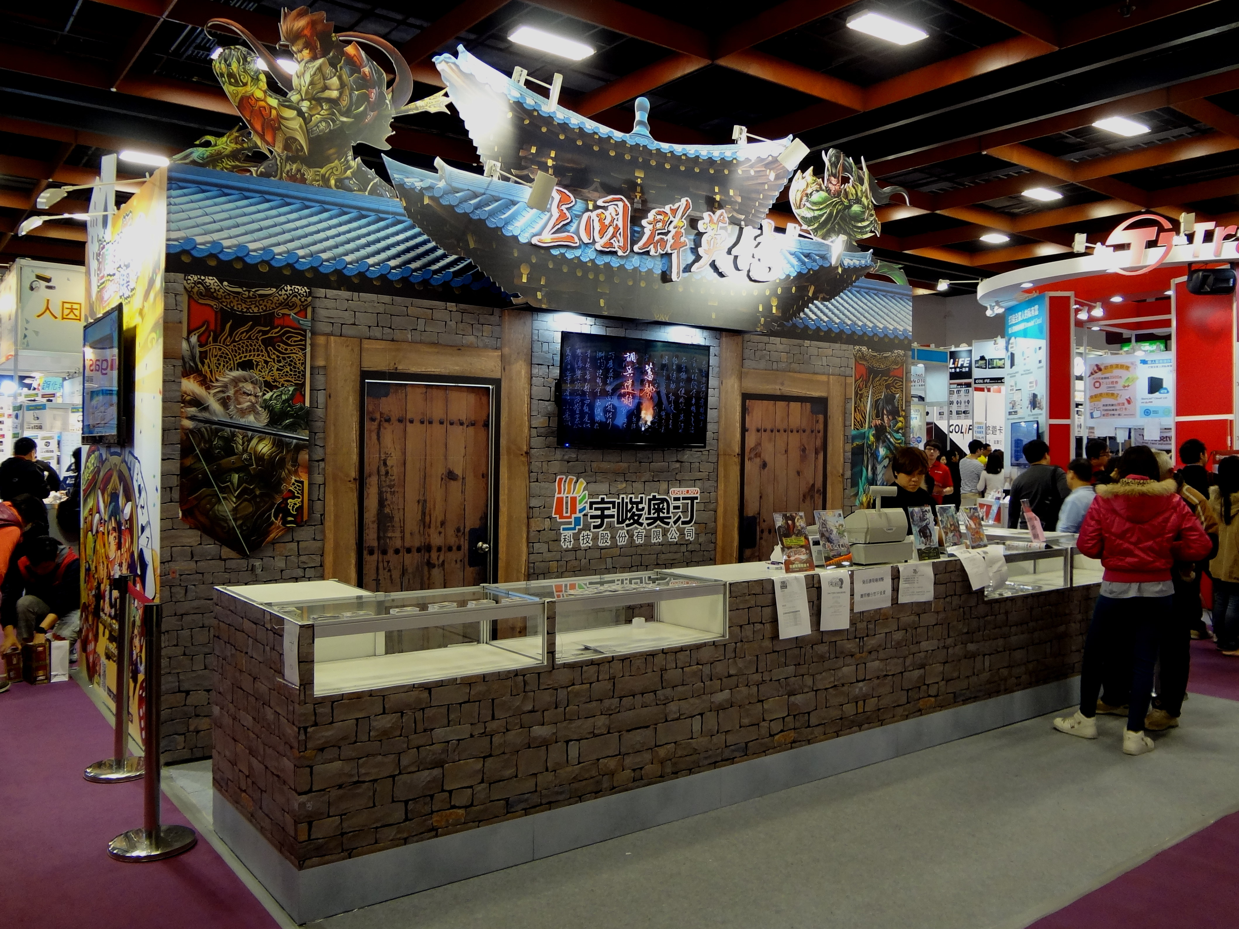 2016年台北資訊月，宇峻奧汀科技攤位。